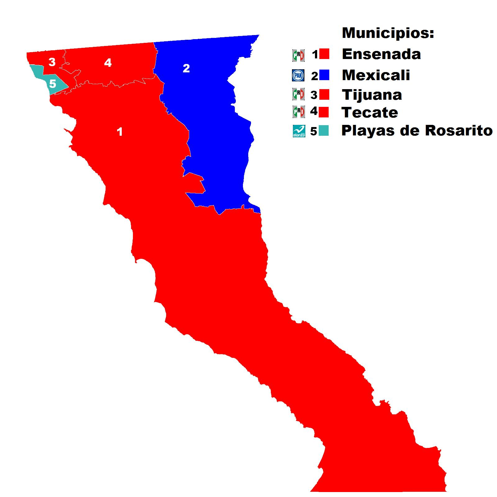 Asi quedaron los puestos tras las elecciones estatales de 2013 en BC